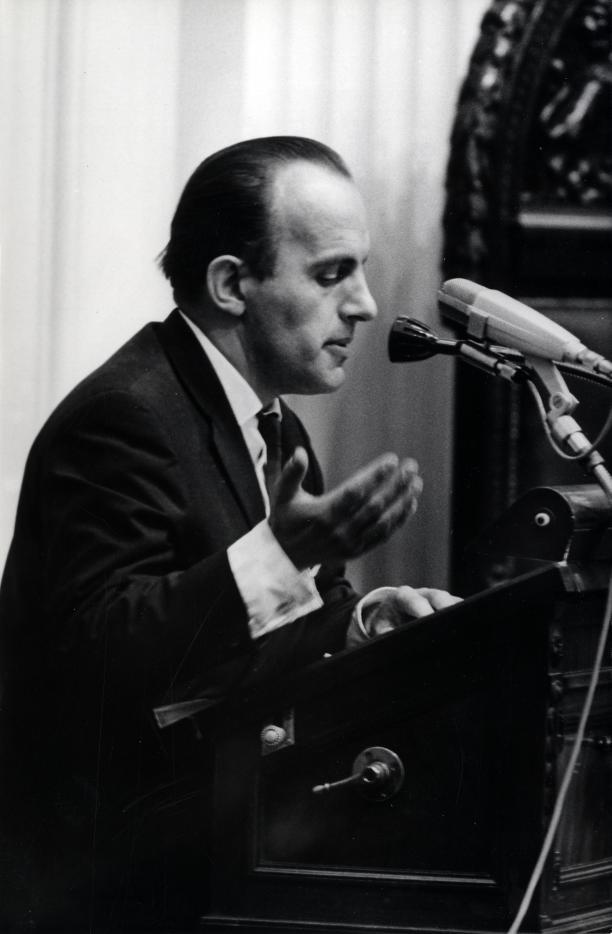 Bruggeman jr., A.J. (PSP). PSP-parlementariër Bruggeman aan het woord tijdens de behandeling in de Tweede Kamer van het ontslag van hoofdcommissaris v.d Molen. Nederland, Den Haag, 30 juni 1966.